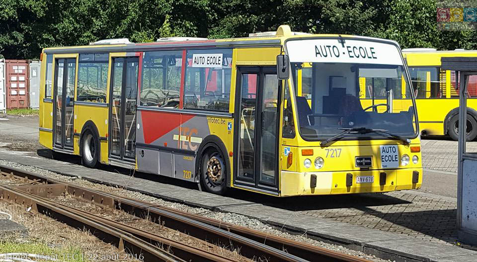 TEC Charleroi 7217 - Auto-écoleJumet, dépôt TEC - 22 août 2016Van Hool A280 MAN (ex-STIC 217) (06/1988)